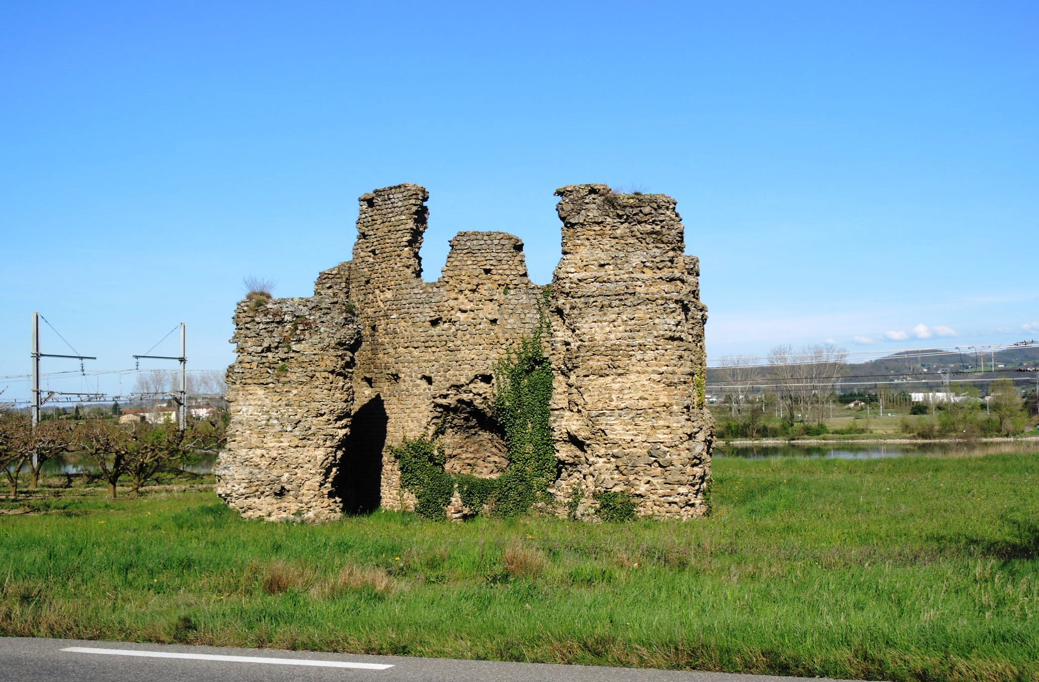 Andance vue générale et détails